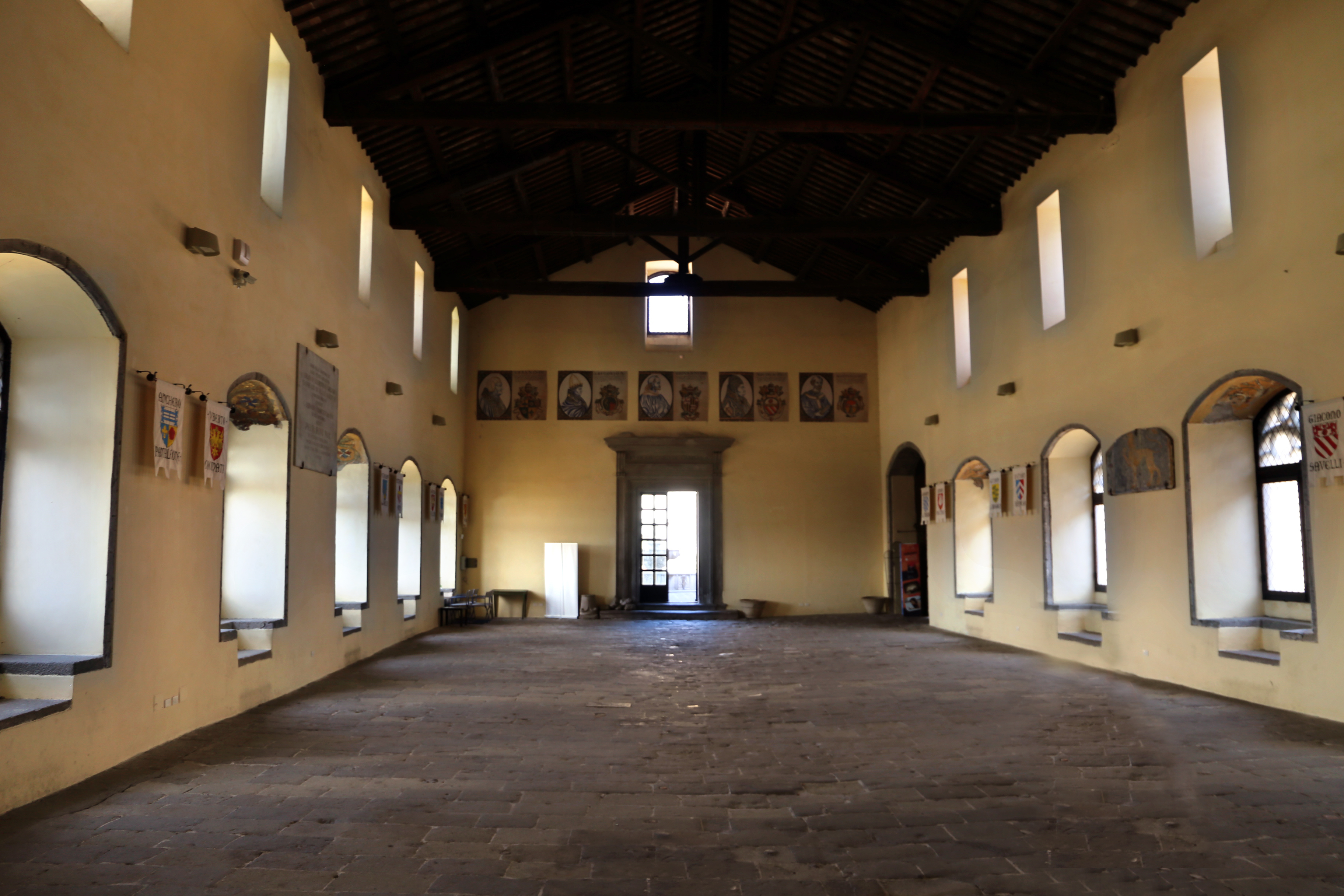 Museo del Colle del Duomo (Viterbo) - Palazzo dei Papi This is a photo of a monument which is part of cultural heritage of Italy.